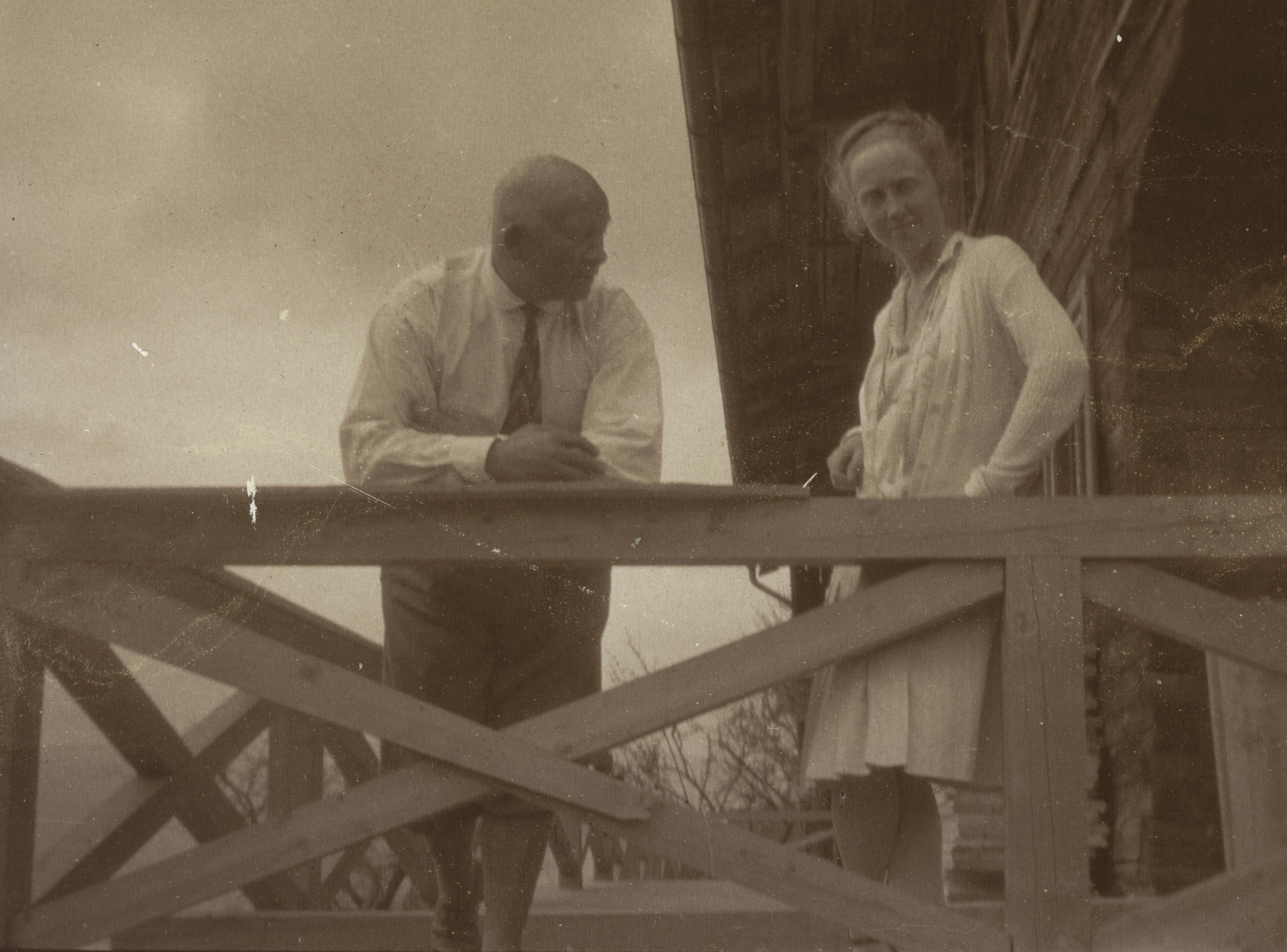 Bildet er hentet fra Nasjonalbibliotekets bildesamling Depicted person: Gulbransson, Olaf Depicted person: Gulbransson, Dagny Bjørnson